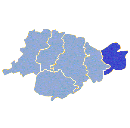 Powiat świebodziński - Gmina Zbąszynek